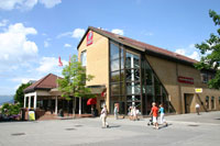 Helgeland Sparebanks bygg i Mo i Rana